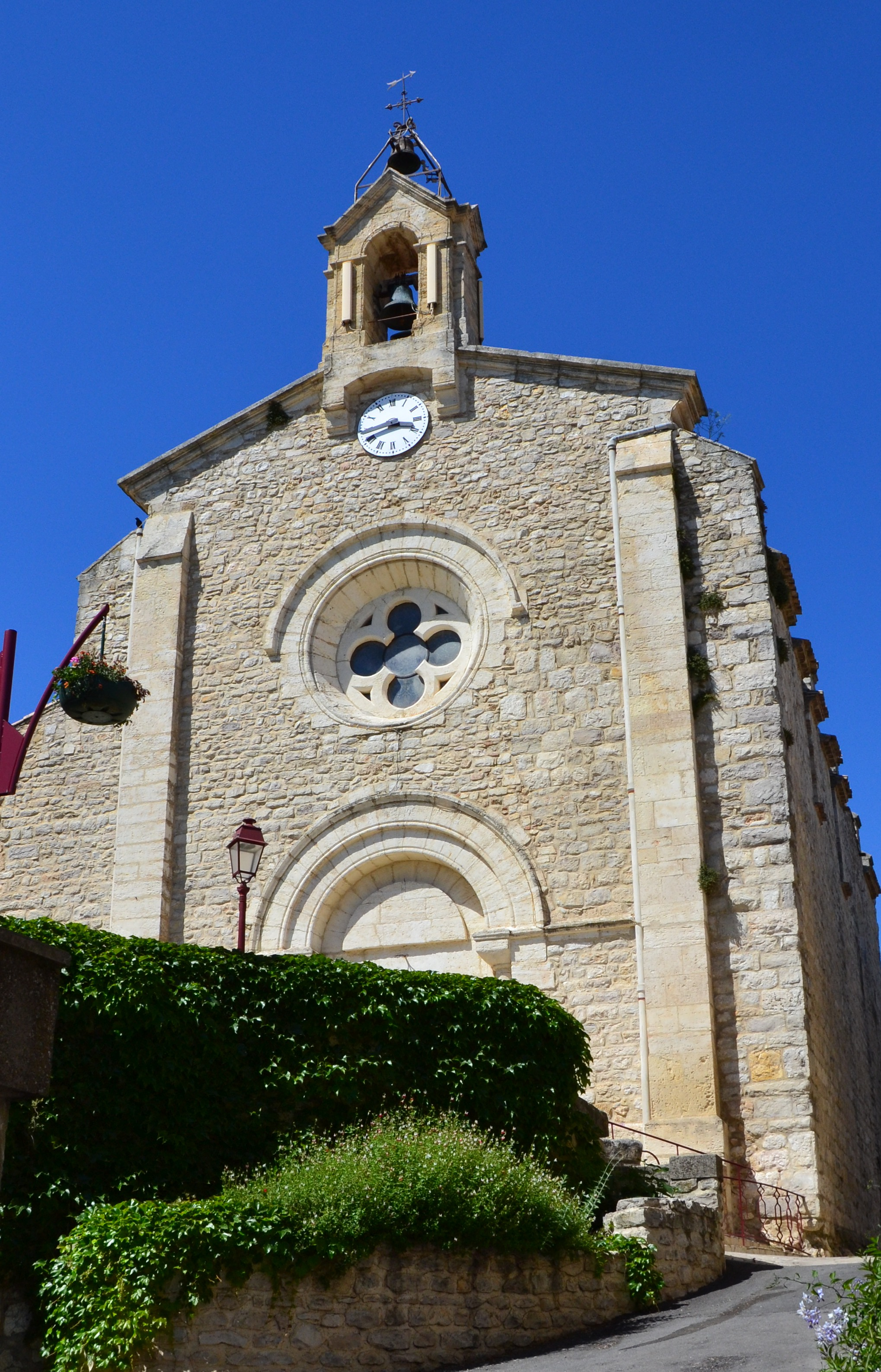 L'église Saint-André de Teyran (Hérault).